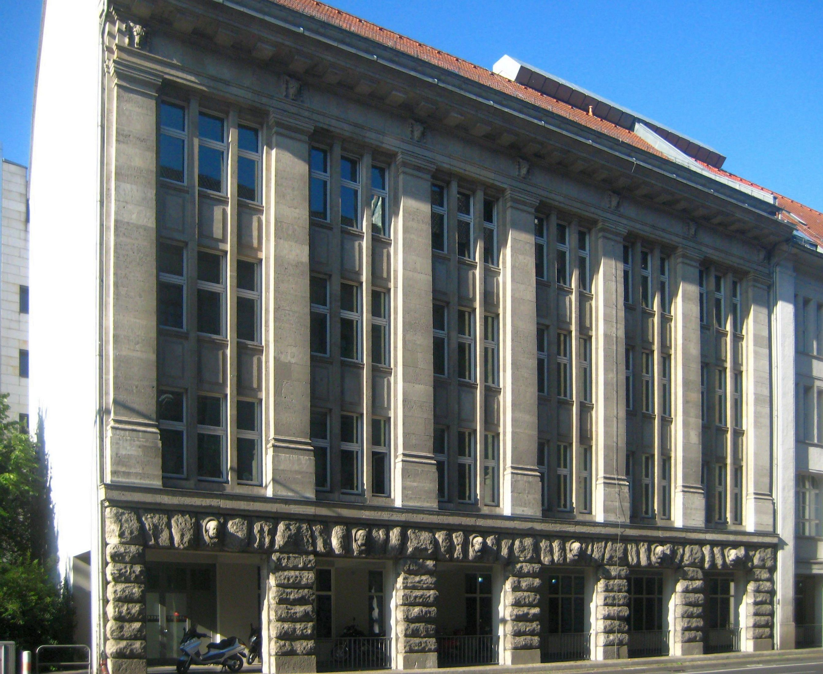 Historisches Geschäftshaus in der Stralauer Straße (ehemalige Hausnummer 44-45), heute in den Neubau der Zentrale der Berliner Wasserbetriebe (1998-2000) an der Neuen Jüdenstraße 1-3 integriert. Das 1911-1913 vom Architekten Felix Lindhorst errichtete Gebäude reichte ursprünglich mit Seitenflügeln und mehreren Quergebäuden bis zum Rolandufer; die rückwärtigen Gebäudeteile wurden aber im Zweiten Weltkrieg zerstört und später abgerissen. Hier befand sich einst die Wäschereifabrik von Moritz Rosenthal, der den Gebäudekomplex mit mehreren Höfen 1918 erwarb (seither auch als Rosenthal-Höfe bekannt), als Jude aber 1933 zwangsweise an die Stadt Berlin verkaufen musste; die Rückübertragung an die Erbengemeinschaft erfolgte 1994. Eine Gedenktafel am Haus erinnert an Moritz Rosenthal und seine Frau Ulla, die 1944 in Auschwitz ermordet wurden. Das erhaltene Vorderhaus ist als Teil des Bauensembles Stralauer Straße denkmalgeschützt.